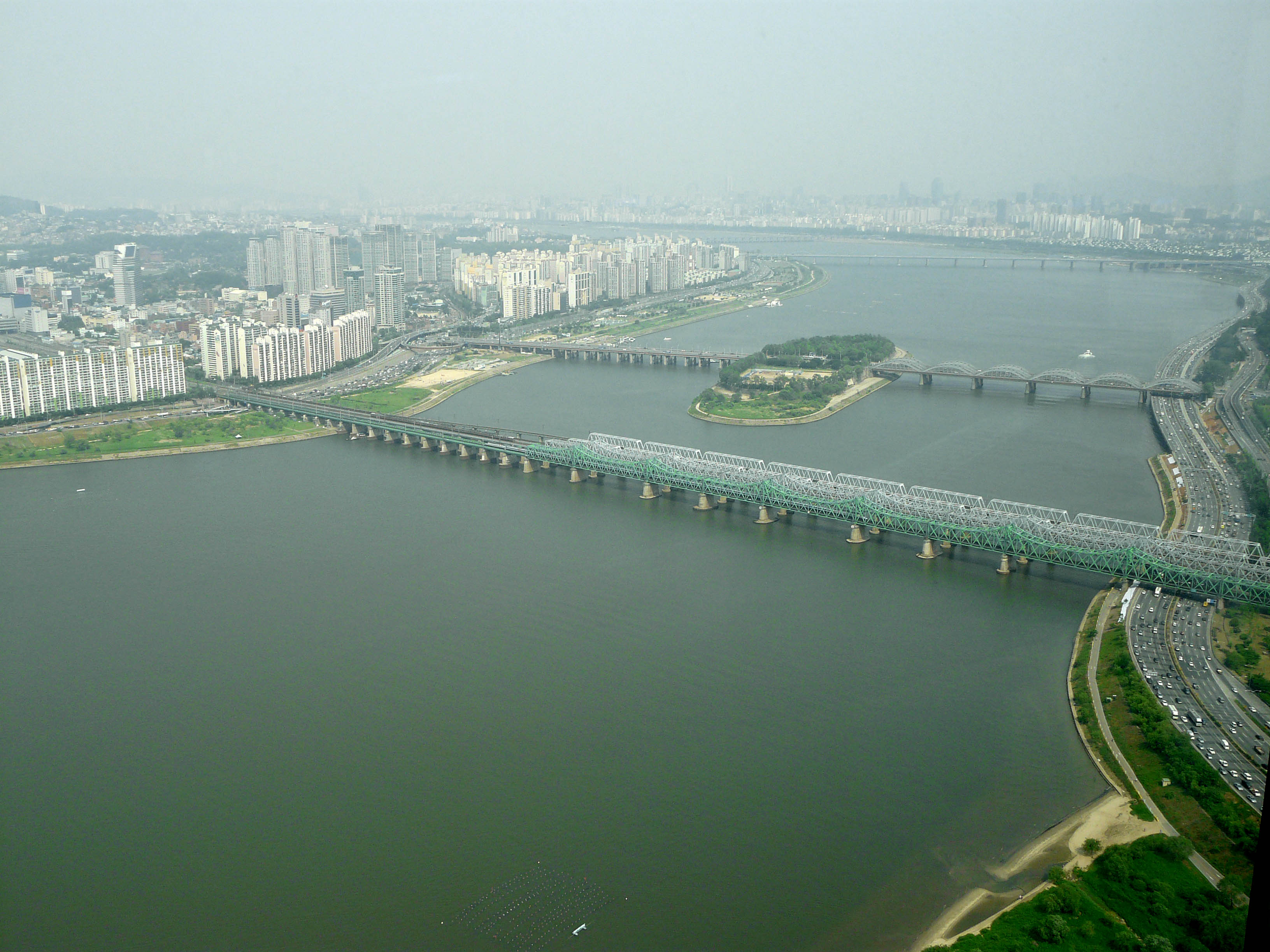 Hangang Railway Bridge